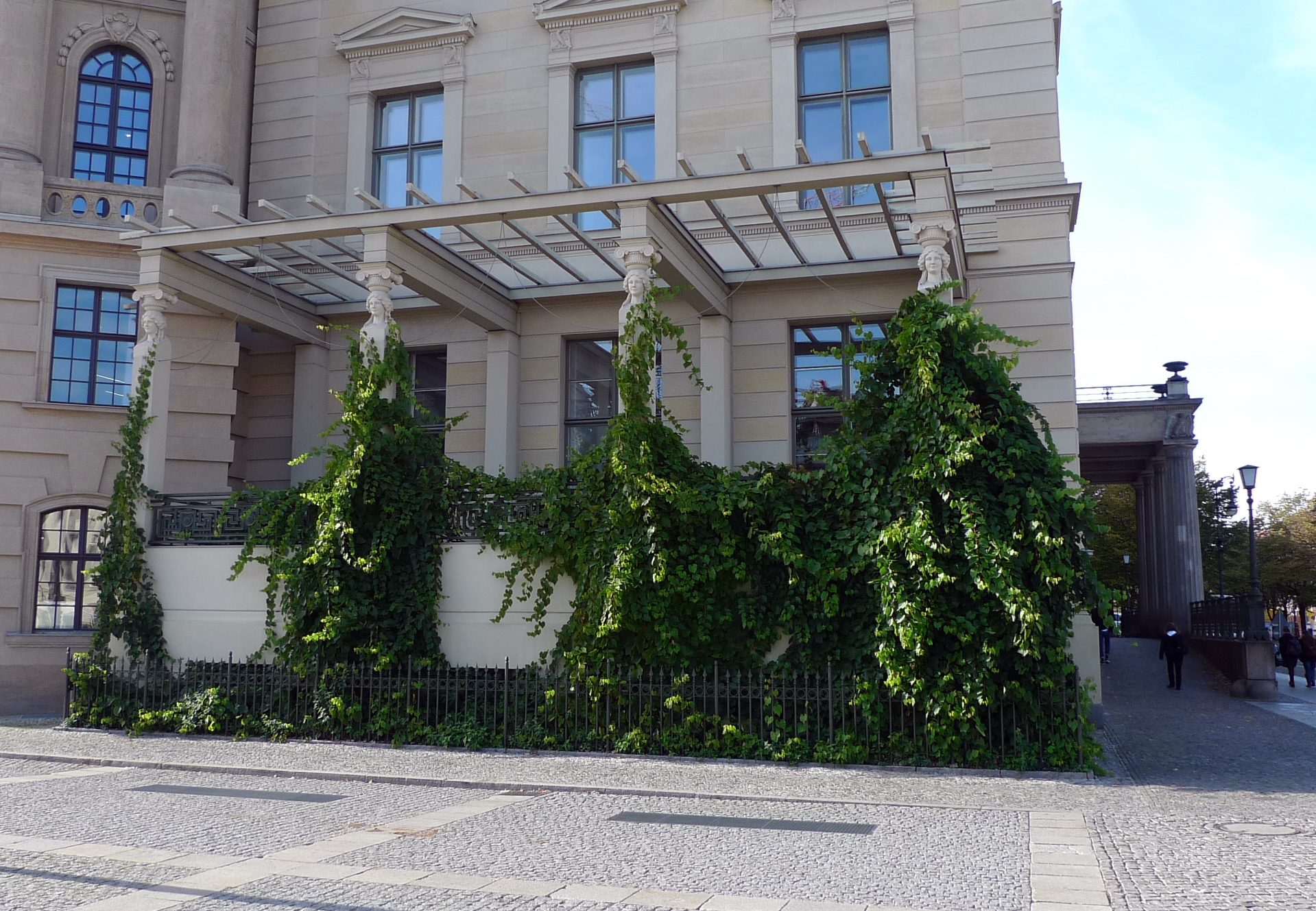 Die Terrasse des Alten Palais am Berliner Bebelplatz